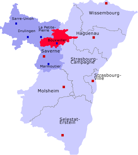 Lage des Kantons Bouxwiller im Arrondissement Saverne und im Département Bas-Rhin